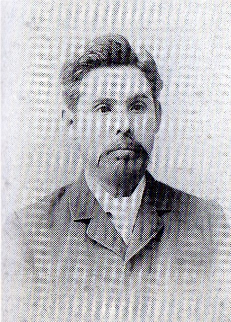 熊本バンドの浮田和民